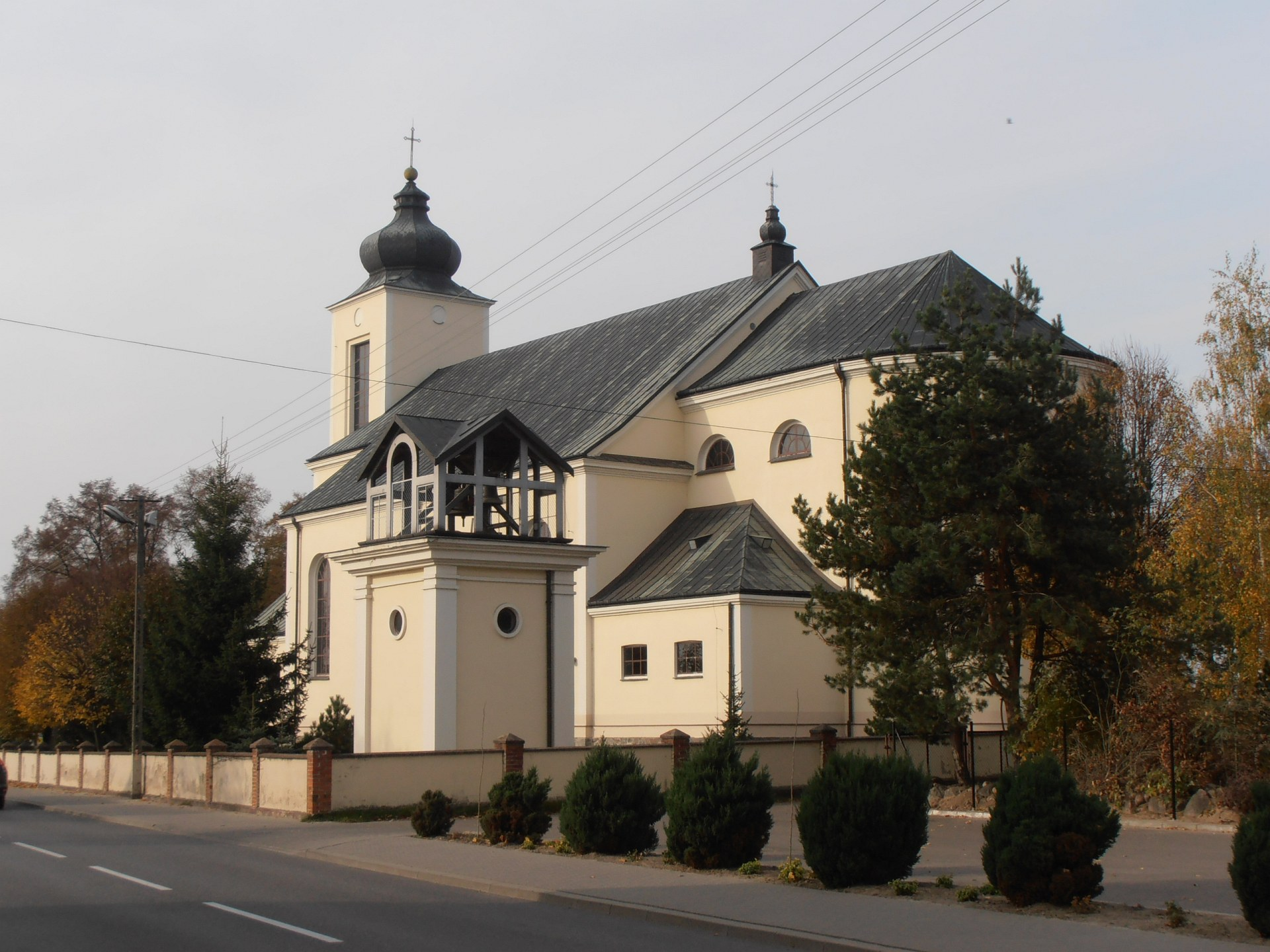 Serokomla (pow. łukowski, woj. lubelskie, Polska). Rzymskokatolicki kościół pw. św. Stanisława.